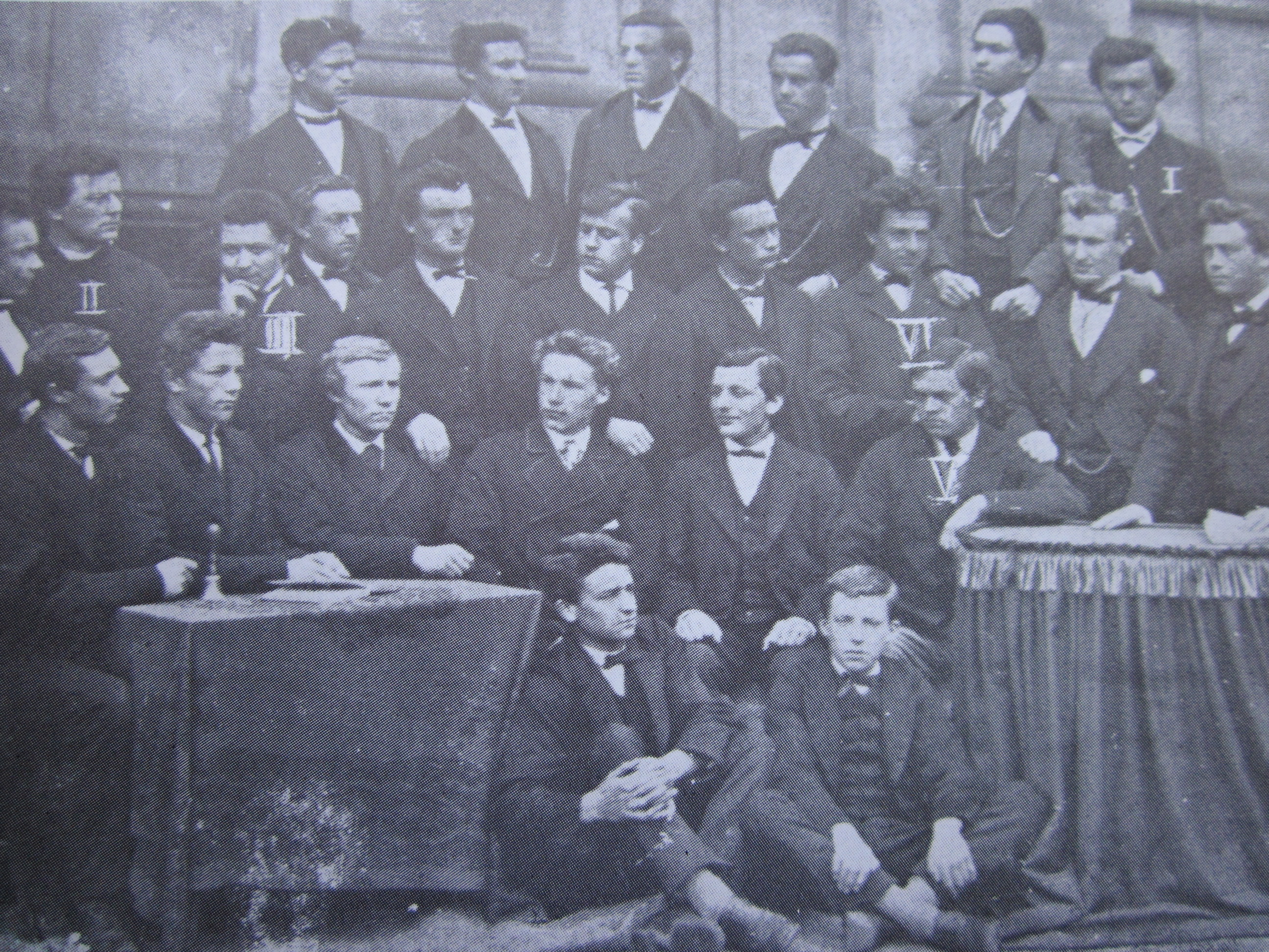 De 'wonderklasse' 1874/75 aan het Klein Seminarie van Roeselare onder leiding van priester Hugo Verriest (II), met o.a. leerlingen Julius Devos (I), Albrecht Rodenbach (III), Kamiel Watteeuw (V) en Constant Lievens (VI). Inhoudelijke beschrijving: De Société Littéraire van het Klein Seminarie te Roeselare, schooljaar 1874-1875. Op de bovenste rij staan Jules Catsel, Leon Jooris, Desiré Flour, Jules Damme, Kamiel Denys en Julius Devos. Op de tweede rij rechtstaand Rodolf Huyghebaert, Hugo Verriest, Albrecht Rodenbach, Karel den Duyver, Pieter Reynaert, Armand Ghyssaert, Romaan Dewilde, Constant Lievens (derde van rechts), Arthur van Tomme en Gustaaf van de Putte. Zittend op stoeltjes: Hendrik Desmet, Cyriel van Coillie, Jules van Dosselaere, Louis Laevens, Flor van Campenhout en Kamiel Watteeuw. Op de grond zitten Cyriel vanden Berghe en Isidoor Goemaere.